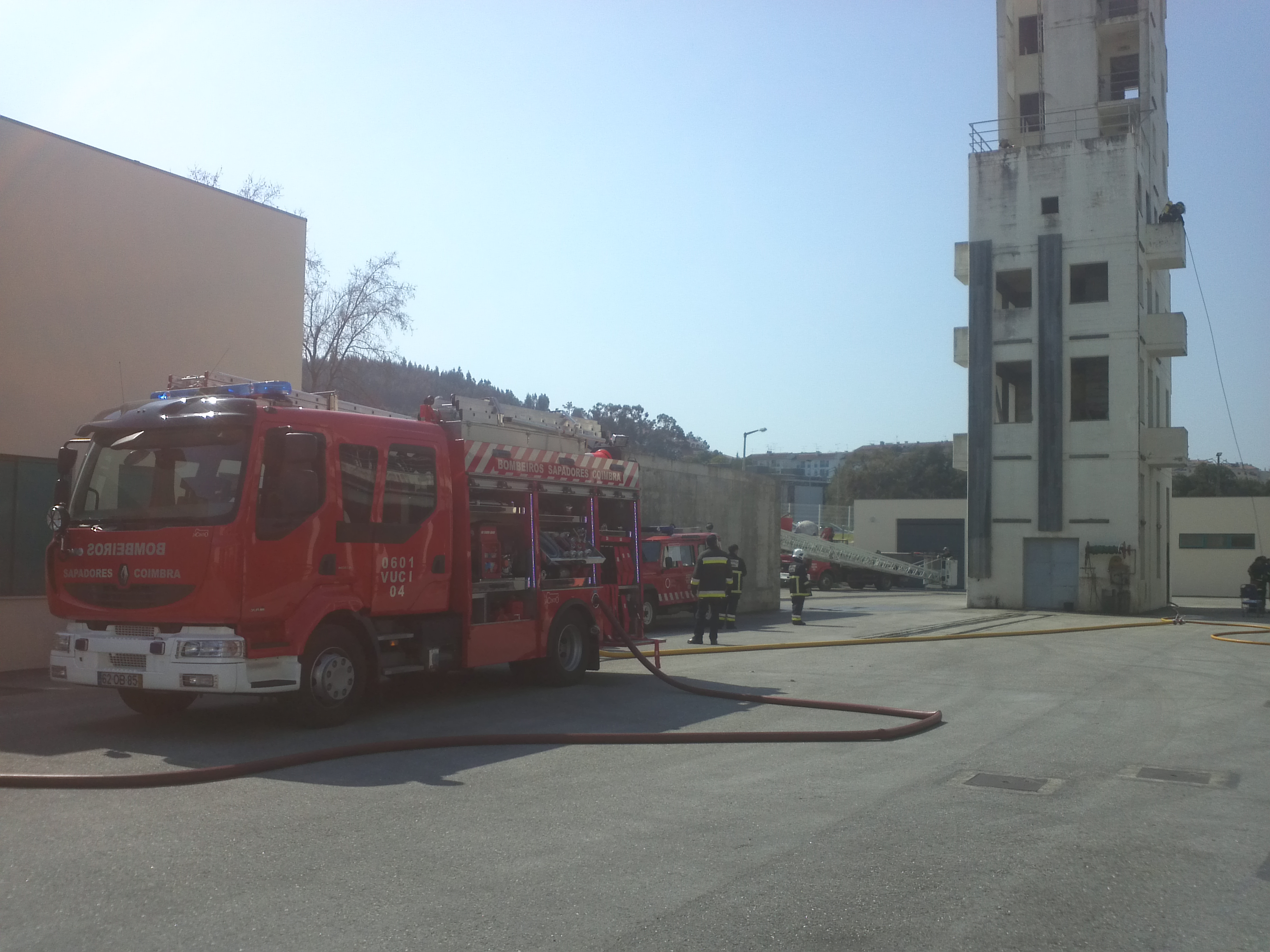 SIMULACRO03